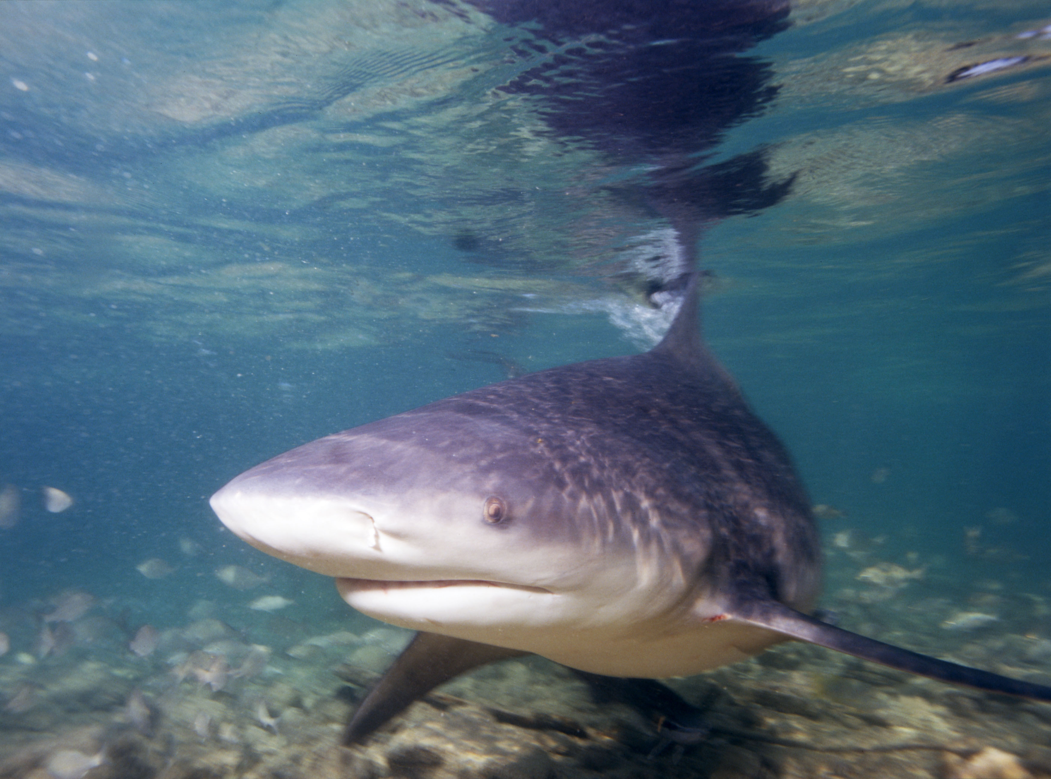 Bull shark